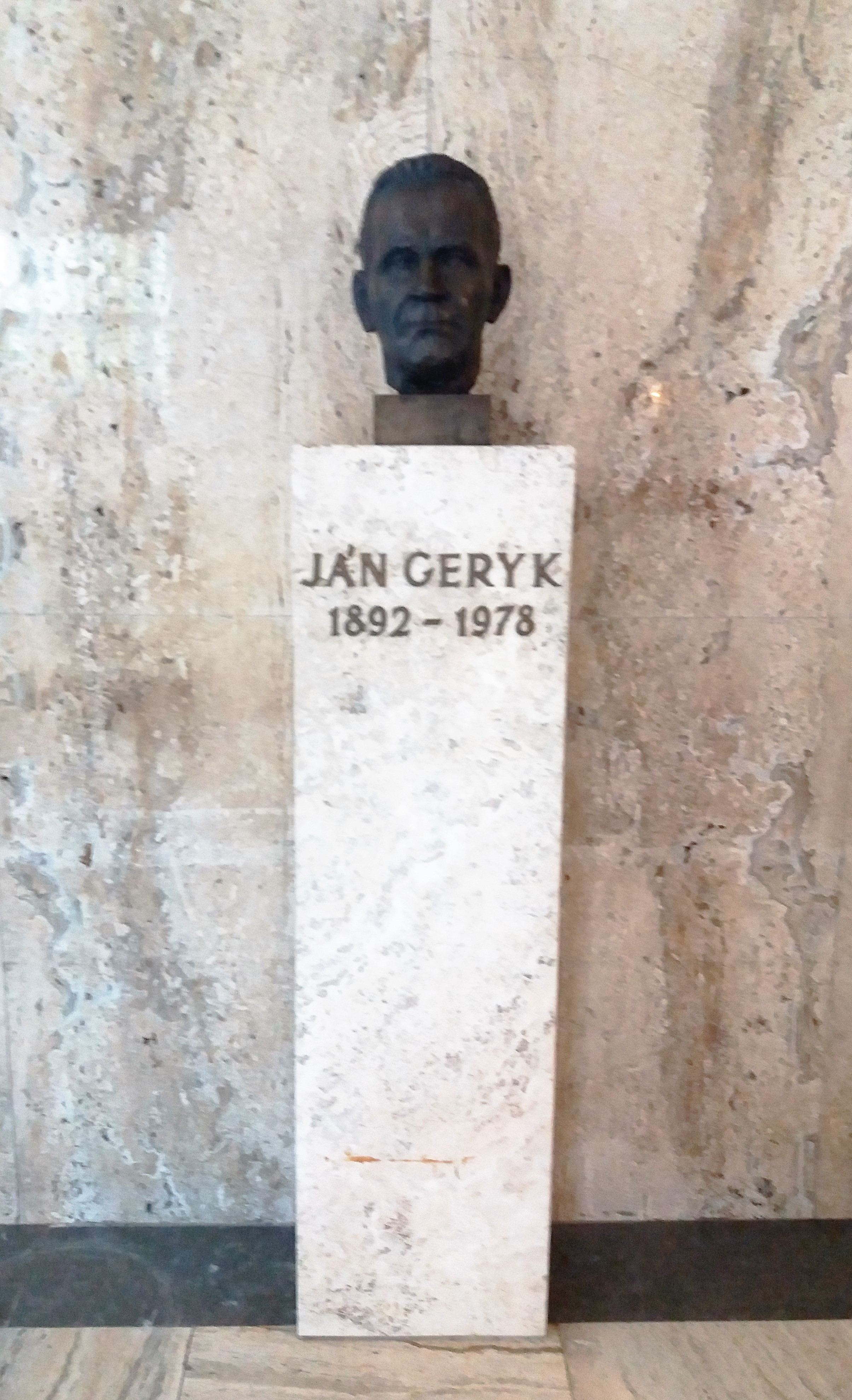 Popiersie Jana Geryka (etnograf, folklorysta, dyrektor Muzeum) w holu Muzeum Etnograficznego w Martinie, na Słowacji